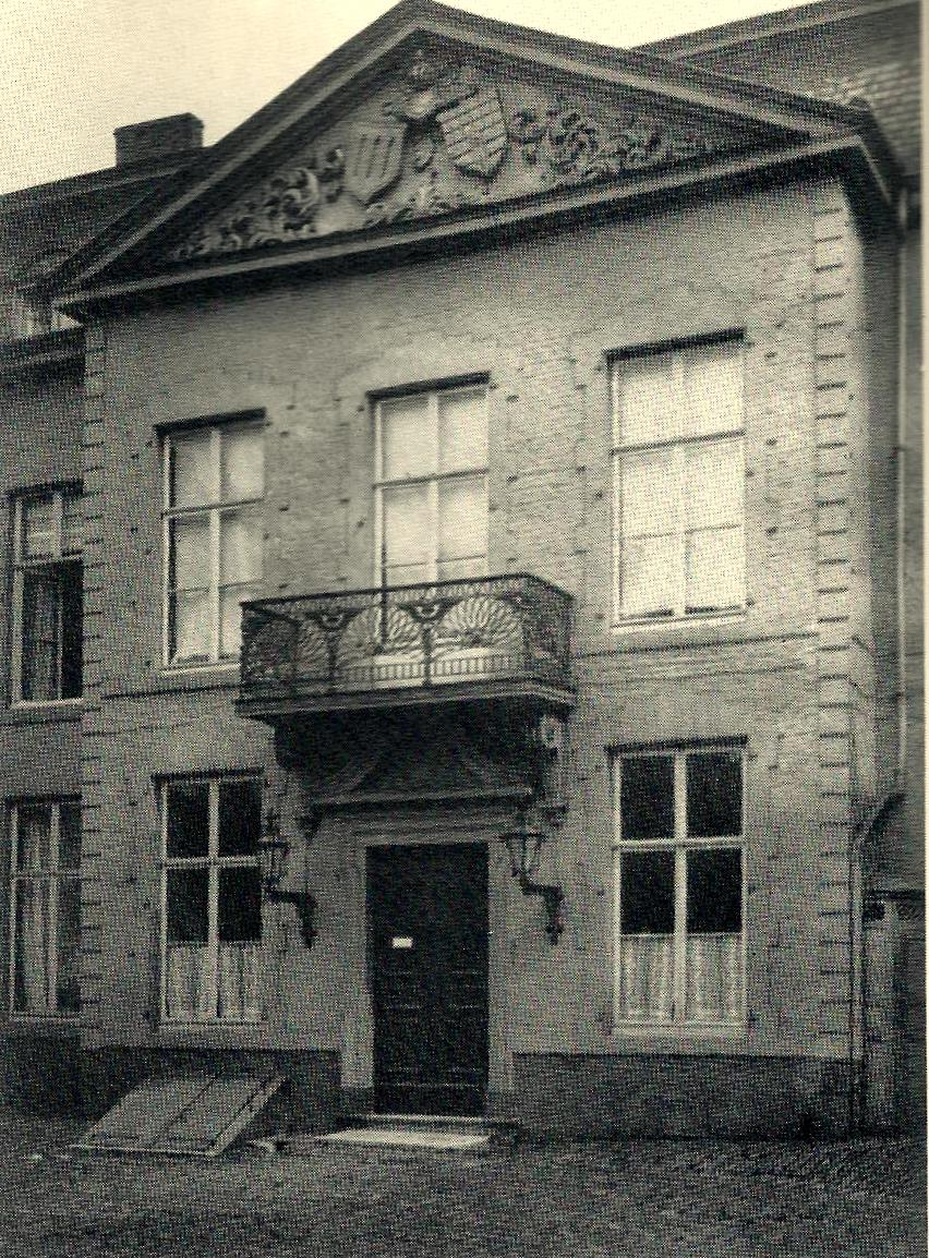 Ehemaliger Londoner Hof in Aachen - Haupteingang